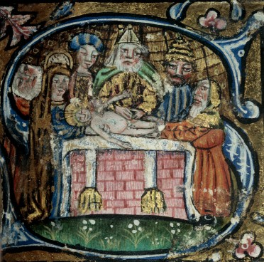 Miniature / Illumination